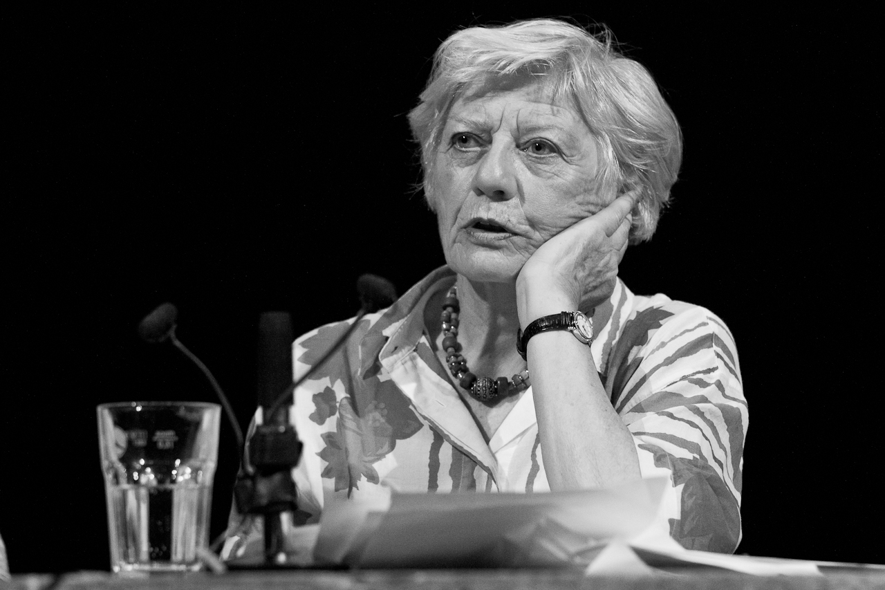 Měsíc autorského čtení 2014